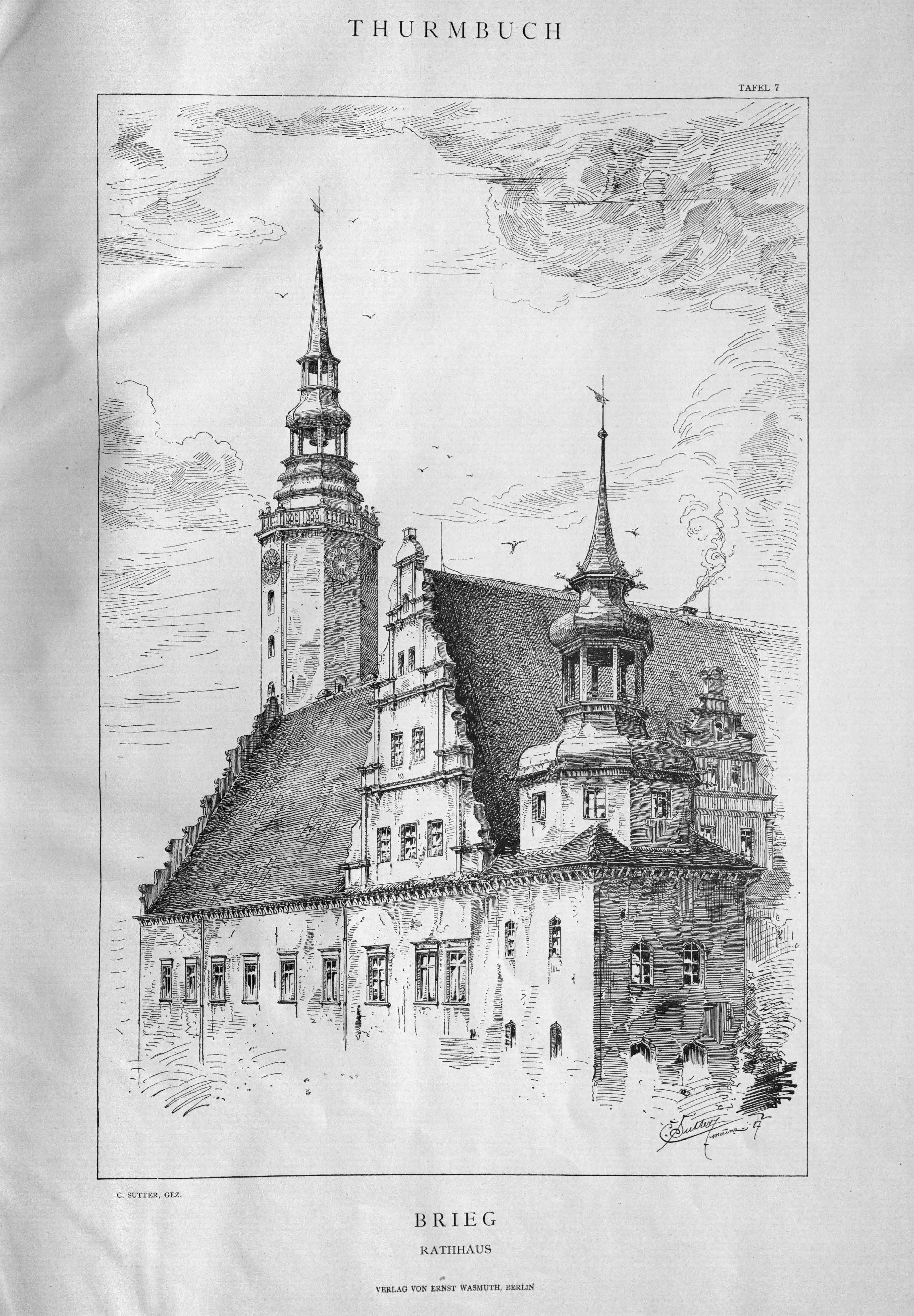 Brzeg (Brieg), Rathaus. Tafel 7 aus Georg Sutter: Thurmbuch – Thurmformen aller Style und Laender. Verlag von Ernst Wasmuth. Berlin 1888.